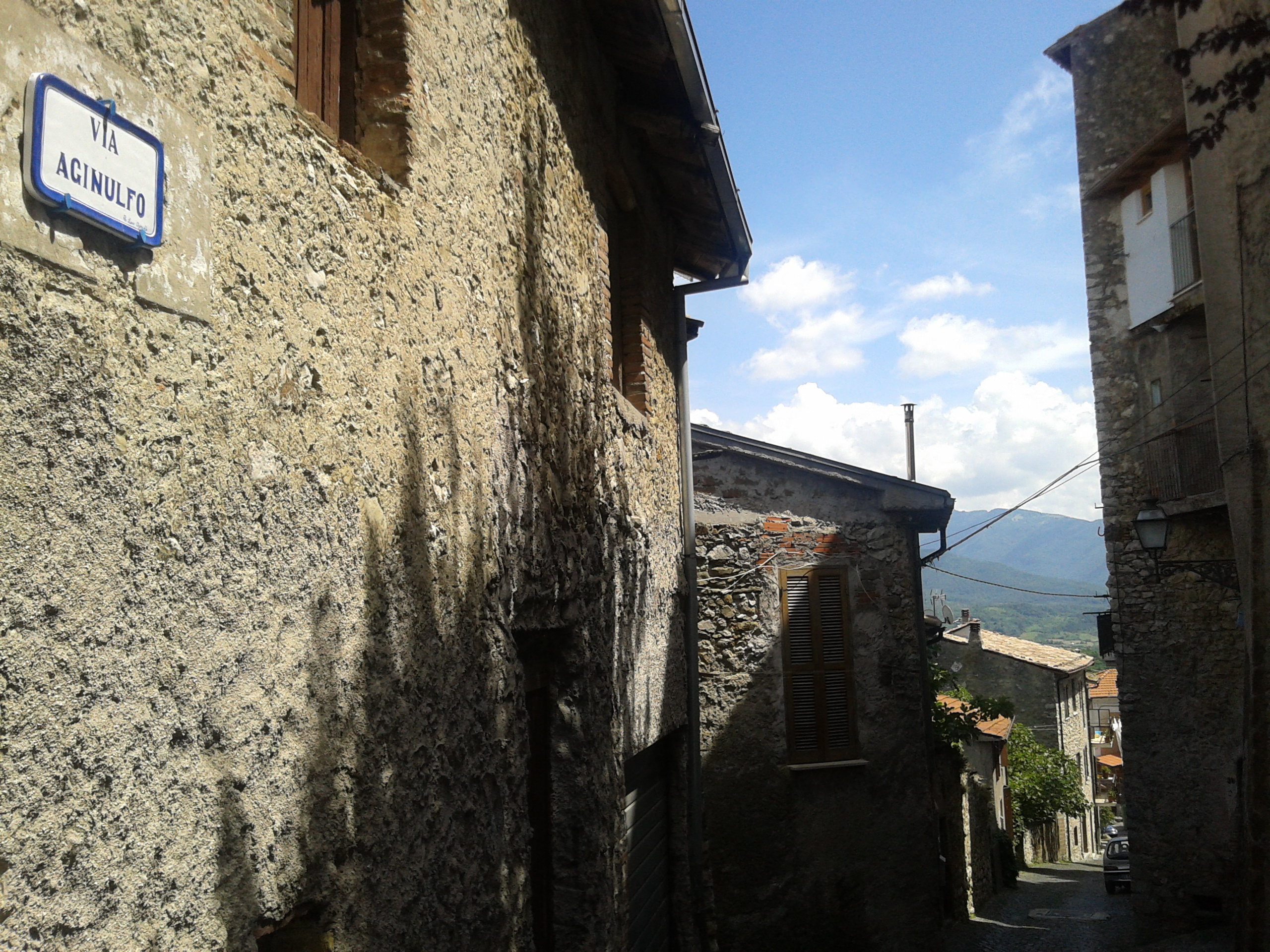 Via Aginulfo a Poggio Cinolfo